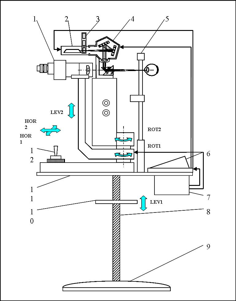 Схема лазерного офтальмологічного терапевтичного апарата - сканера медичного СМ-4 виробництва ТОВ "Ніжинські лабораторії скануючих пристроїв". рисунок для статті Сканер медичний СМ-4. Nizh Labs of Scannig - 59